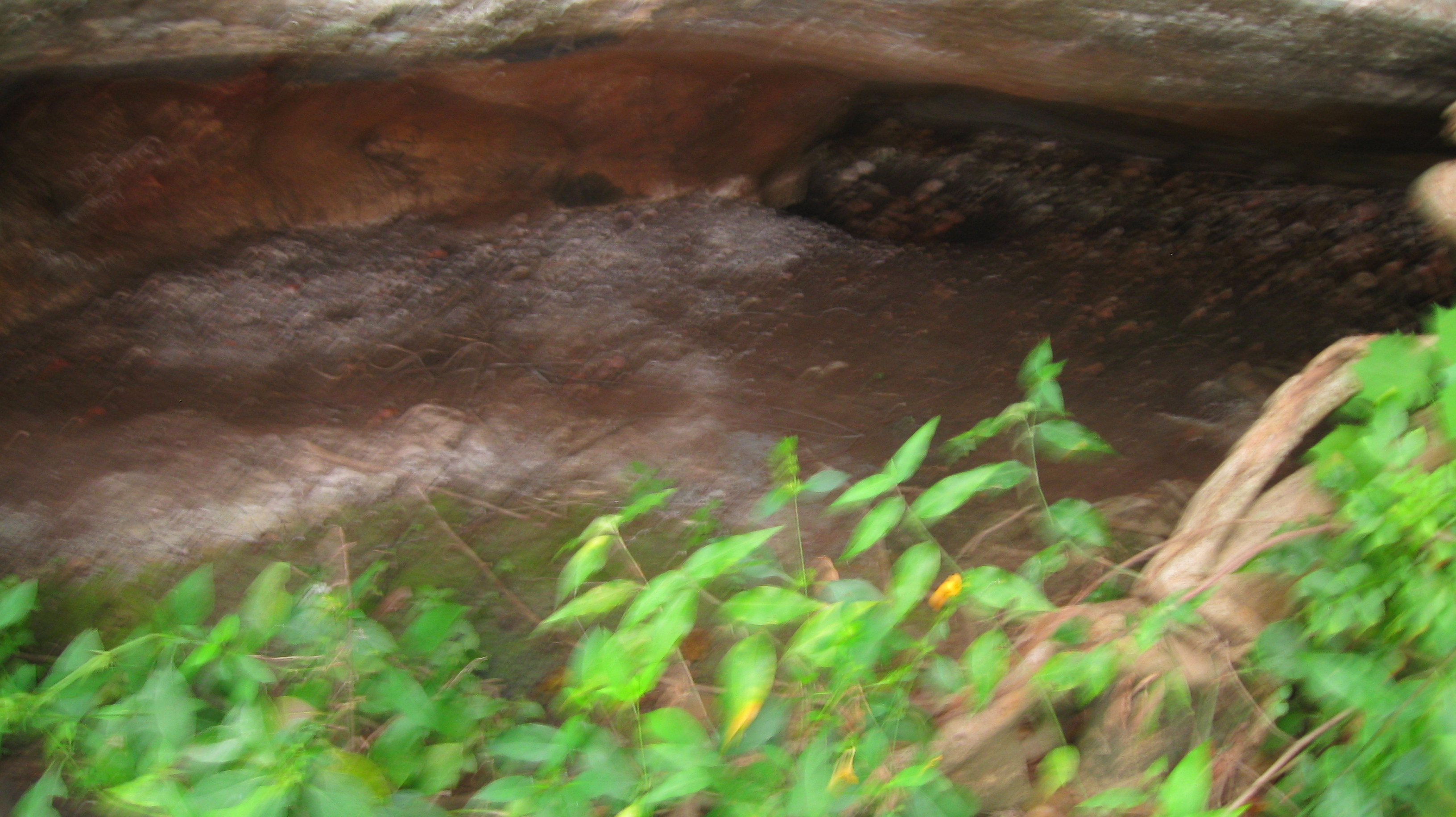 விடுதலைப் போராட்டக் காலத்தில் ஈடுபட்டு புதுக்கோட்டைத் தொண்டைமான் மன்னரால் காட்டிக் கொடுக்கப்பட்ட நிலையில் வீரபாண்டியக் கட்டபொம்மன் மட்டும் மாட்டிக் கொள்ள ஊமைத்துரை தப்பித்து, பிரான்மலையில் உள்ள இக்குகையில் தஞ்சம் அடைந்திருந்தார். அக்குகையின் படம் இது.